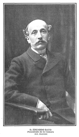 Retrato de Eduardo Dato, fotografiado por Christian Franzen y recogido en la revista española Nuevo Mundo.